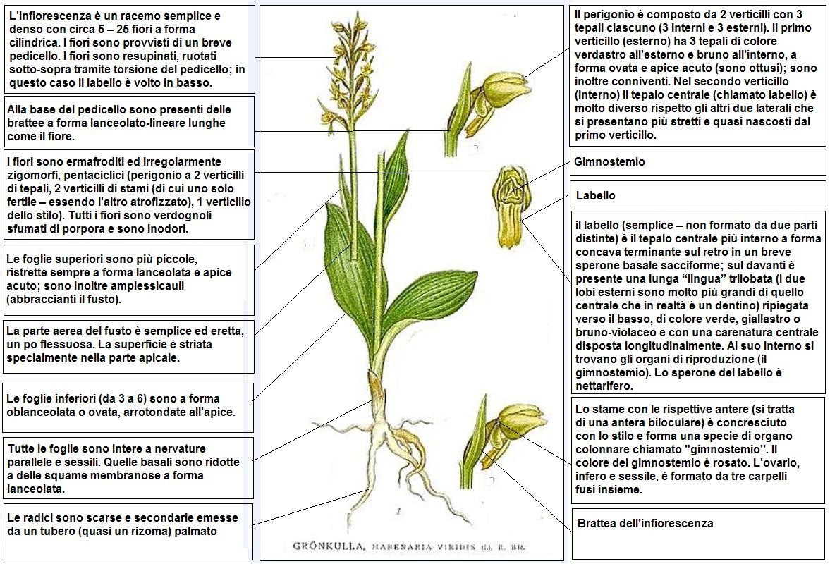 Coeloglossum viride